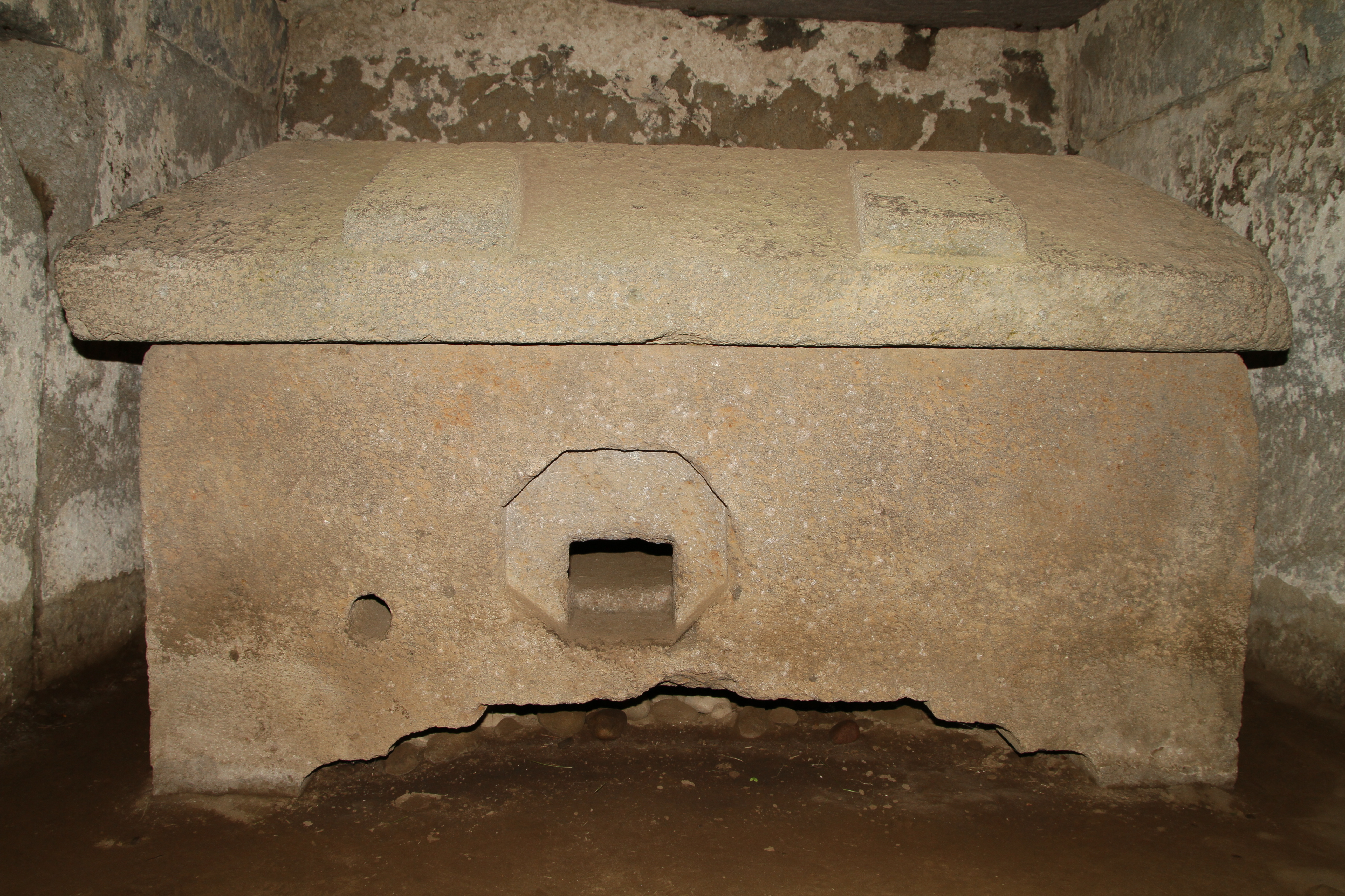 宝塔山古墳の家形石棺